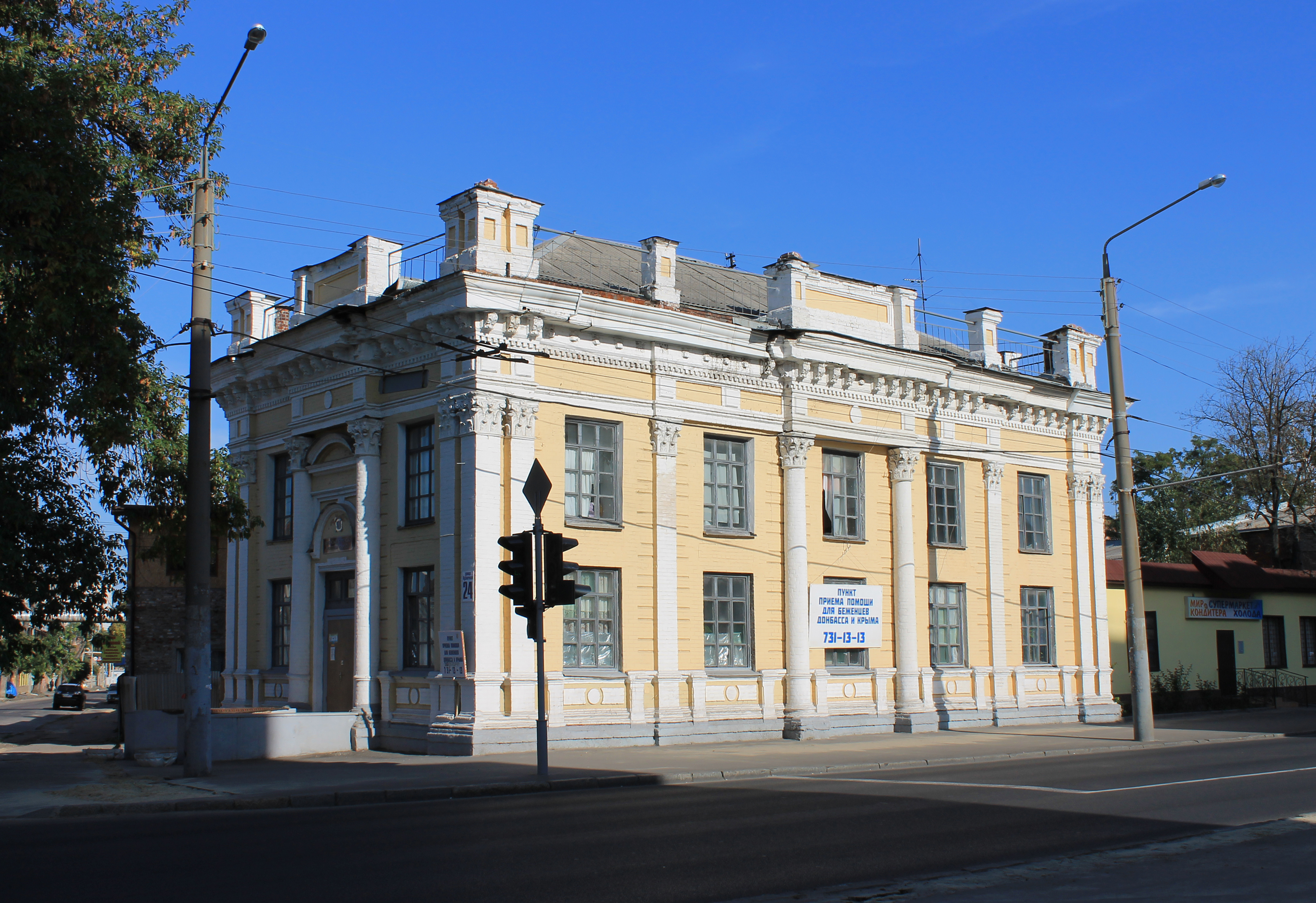 Караїмська кенаса 1893р., вул. Кузнечна, 24, м.Харків